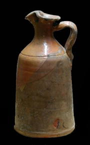 Alcuza esmaltada, para aceite en la casa-museo de Juan Tito (Jaén, España).